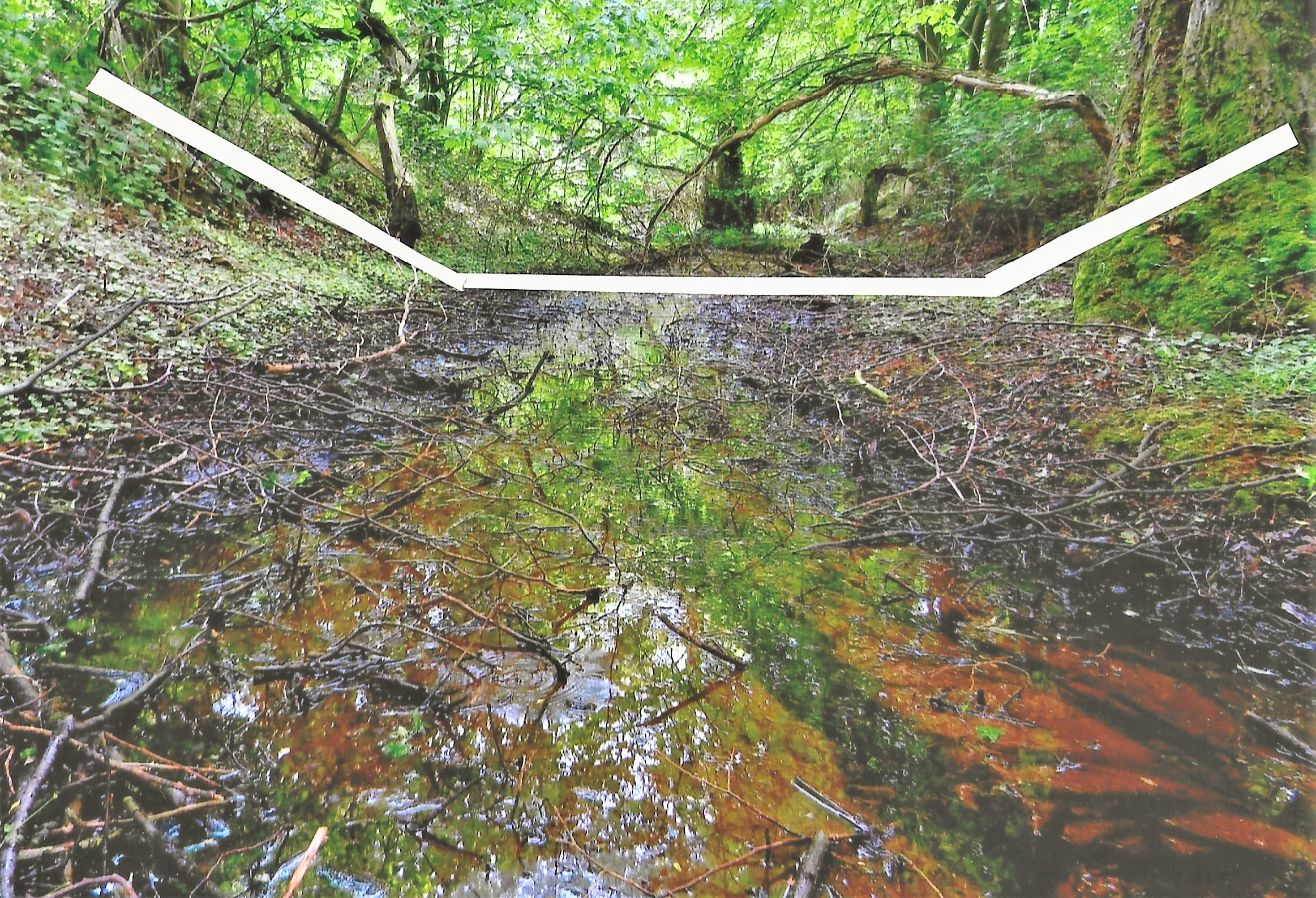 Teil der Isern Purt Anlage, Drei Wälle und Doppelwassergraben am Wedensee